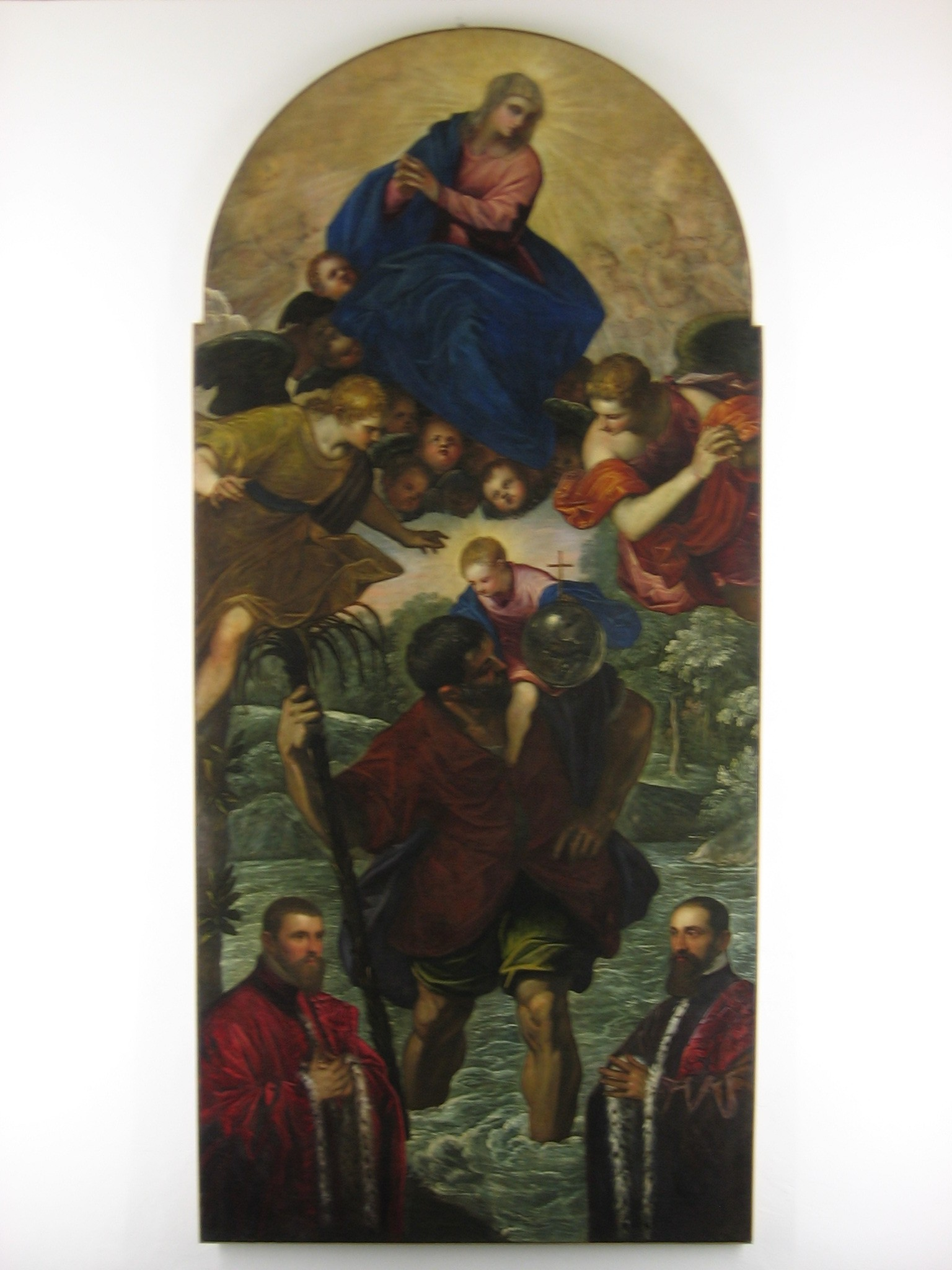 San Cristoforo di Tintoretto (Alzano Lombardo, BG, museo arte sacra)